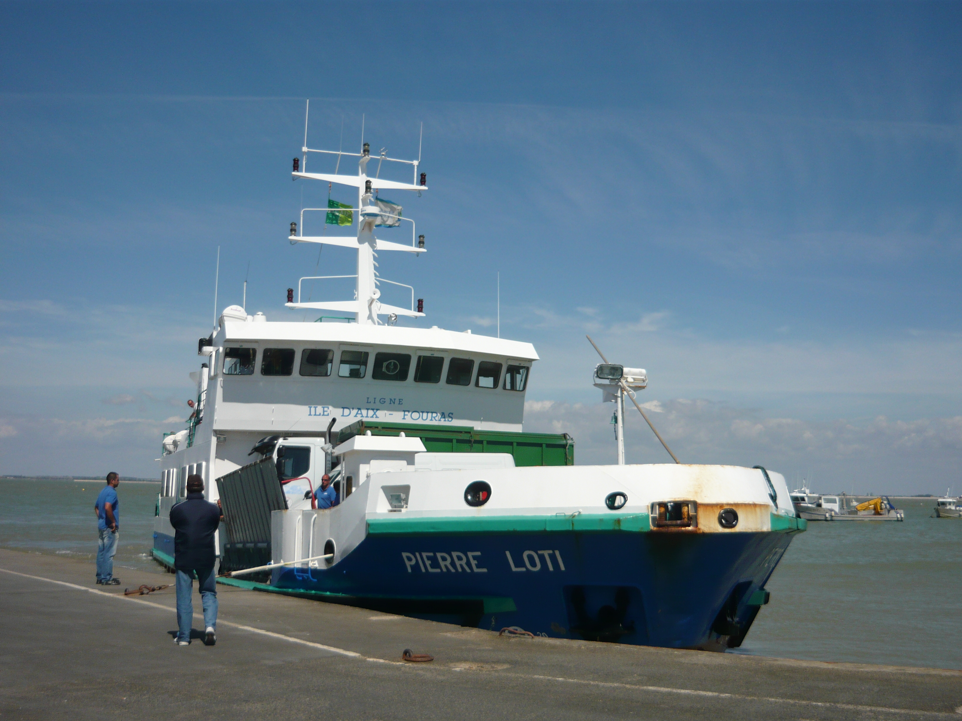 Bac de la liaison maritime Île-d'Aix-Fouras accosté au débarcadère de la Pointe de la Fumée à Fouras.